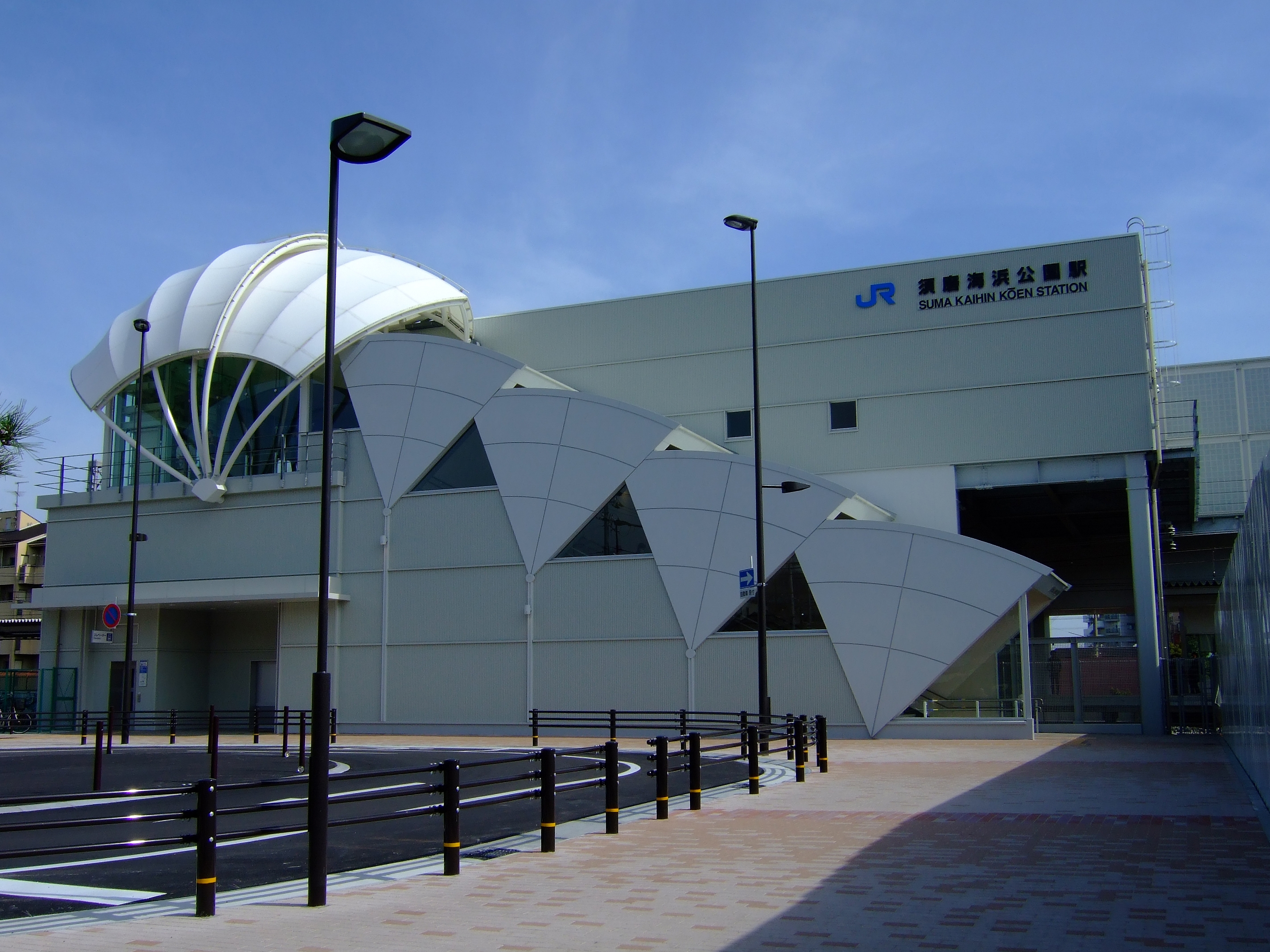 須磨海浜公園駅